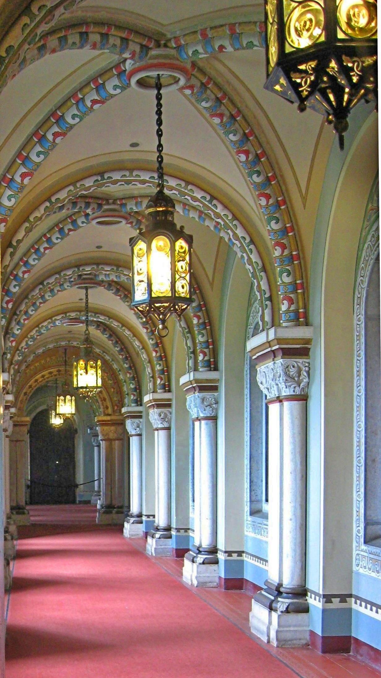 Küche in Neuschwanstein